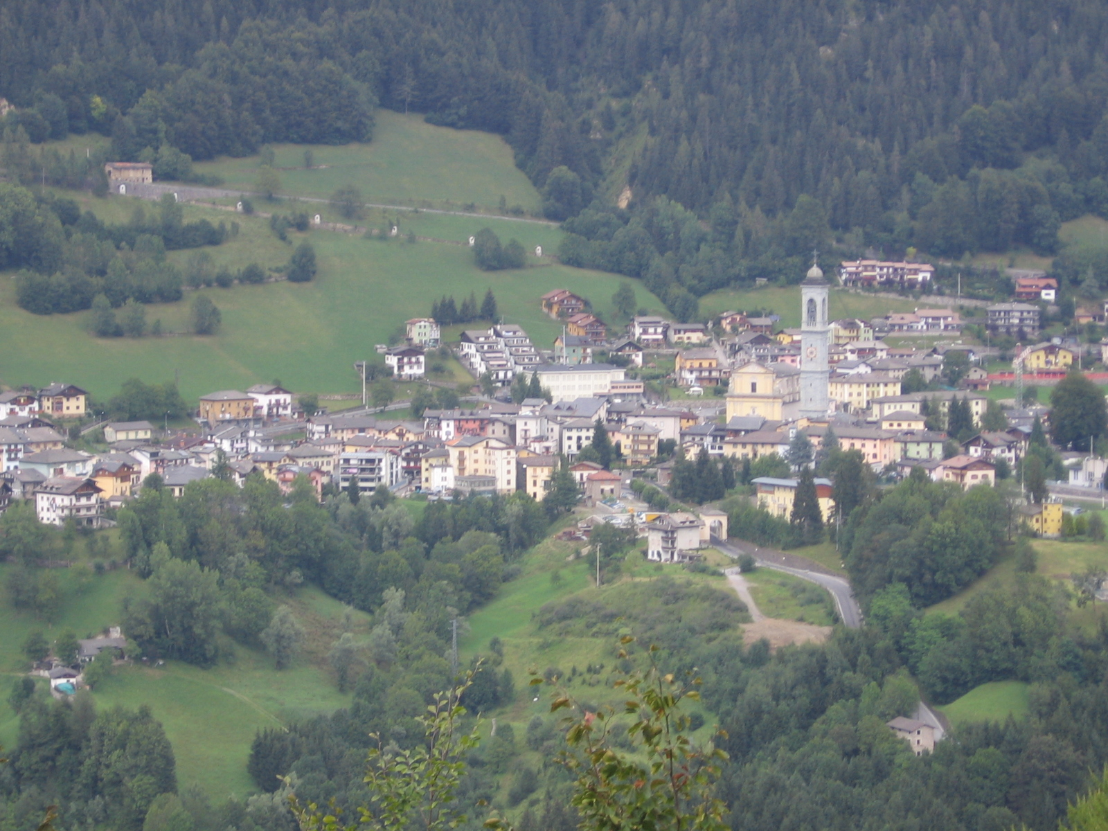 Vilminore di Scalve, Bergamo, Italy